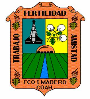 Escudo de Armas del municipio de Francisco I. Madero, Coahuila